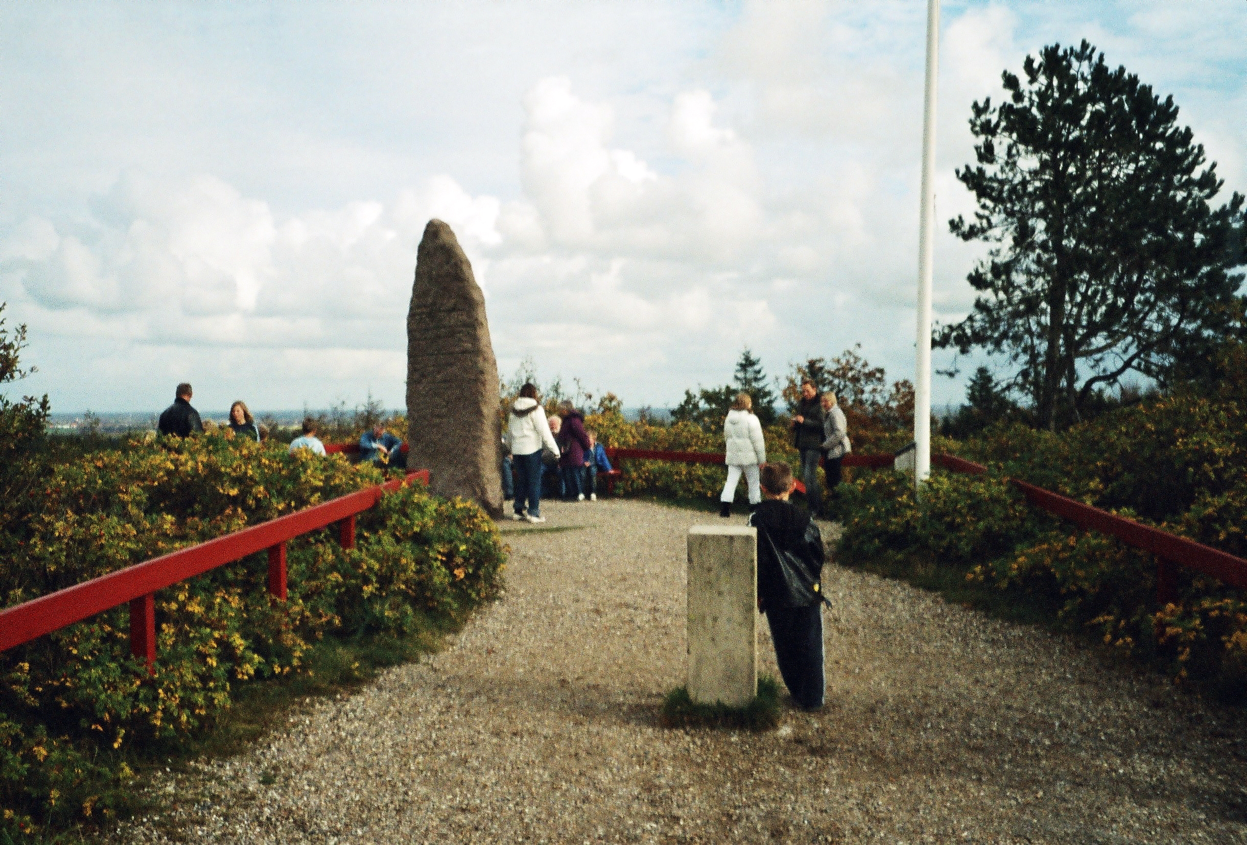 Blaabjerg Klit